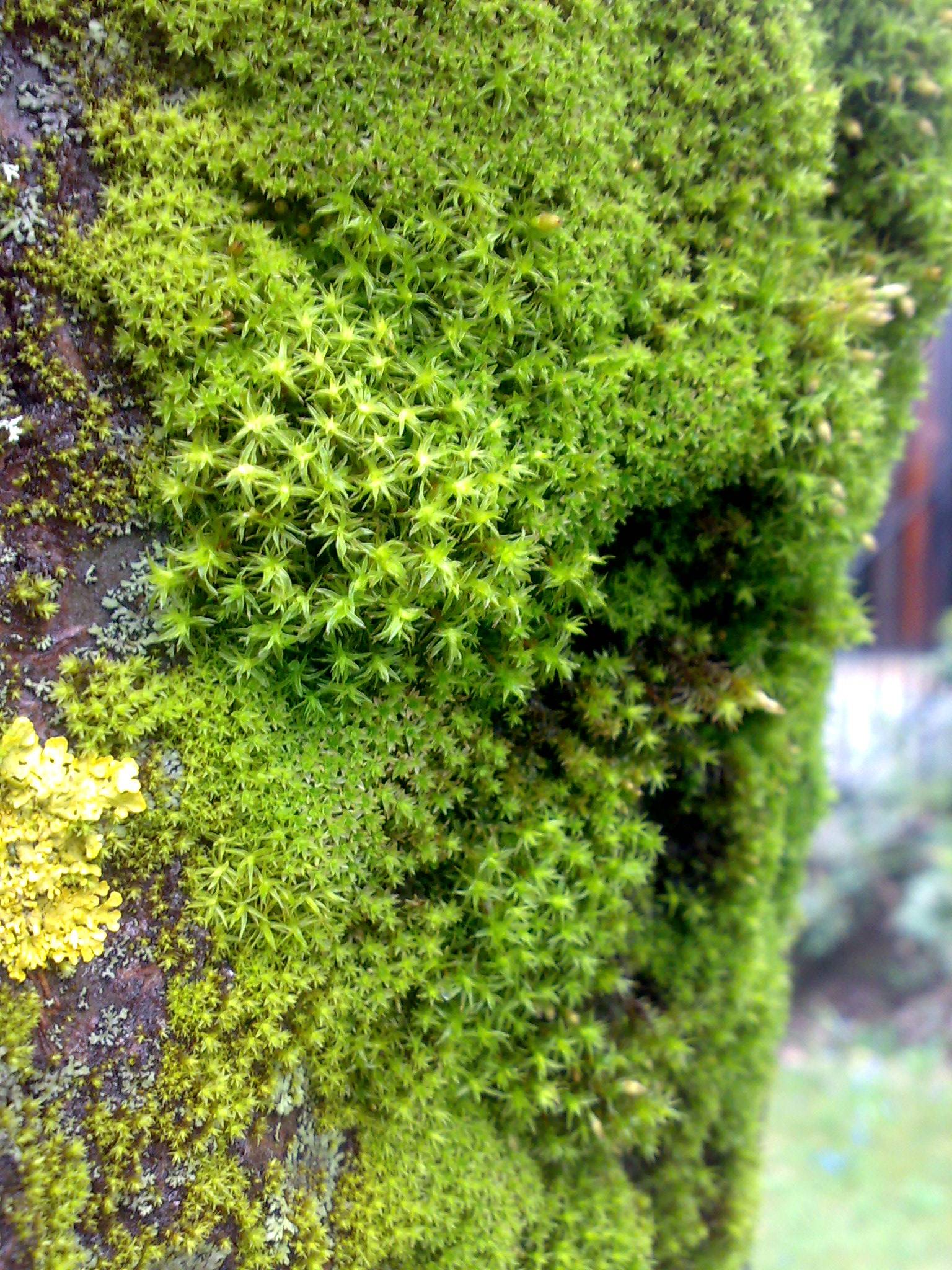 Mose på pyramidepoppel, Oslo